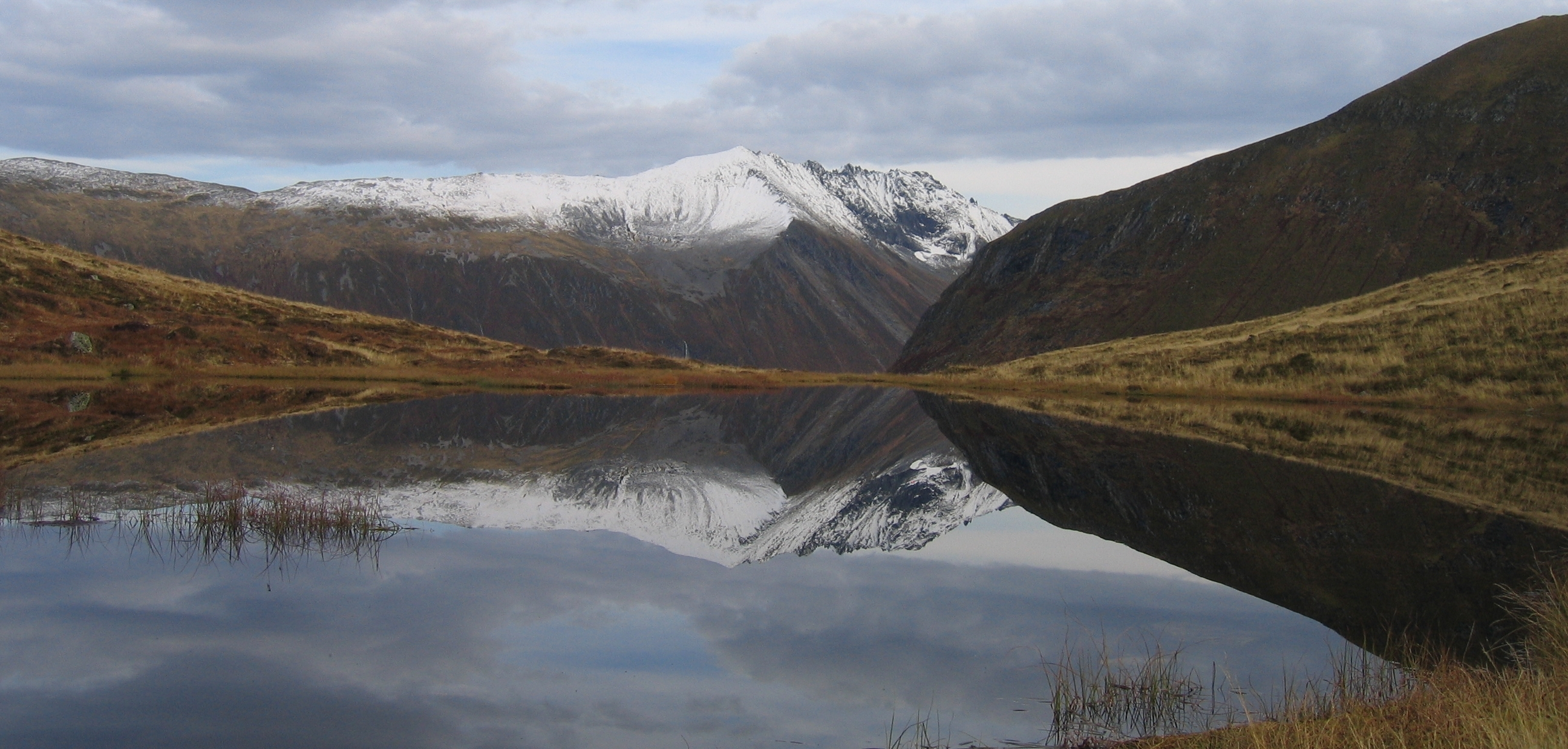 Fossholtinden sett frå vest